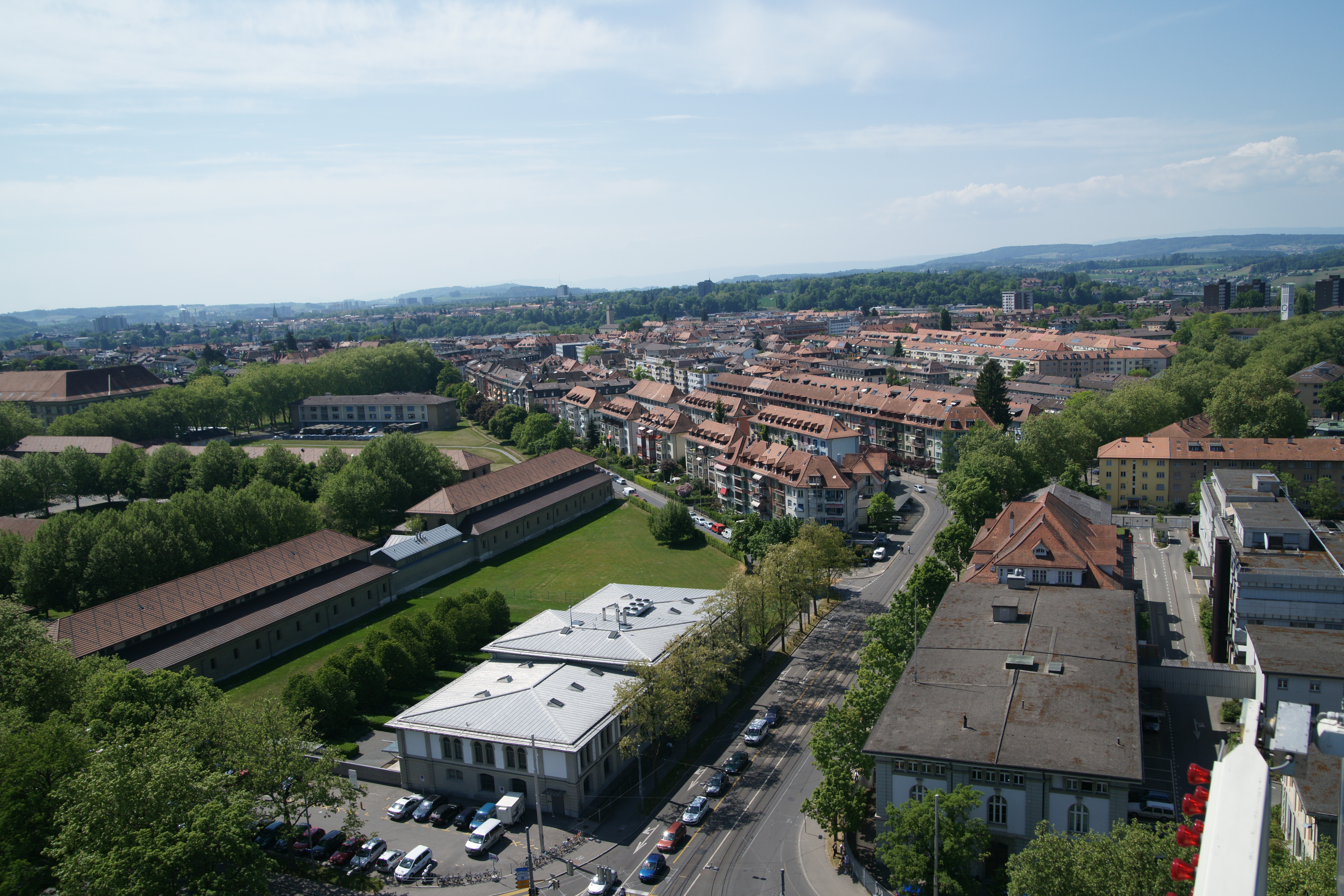 Das Berner Breitenrainquartier vom Riesenrad der Bern BEA expo am Guisanplatz aus Richtung Süden gesehen.